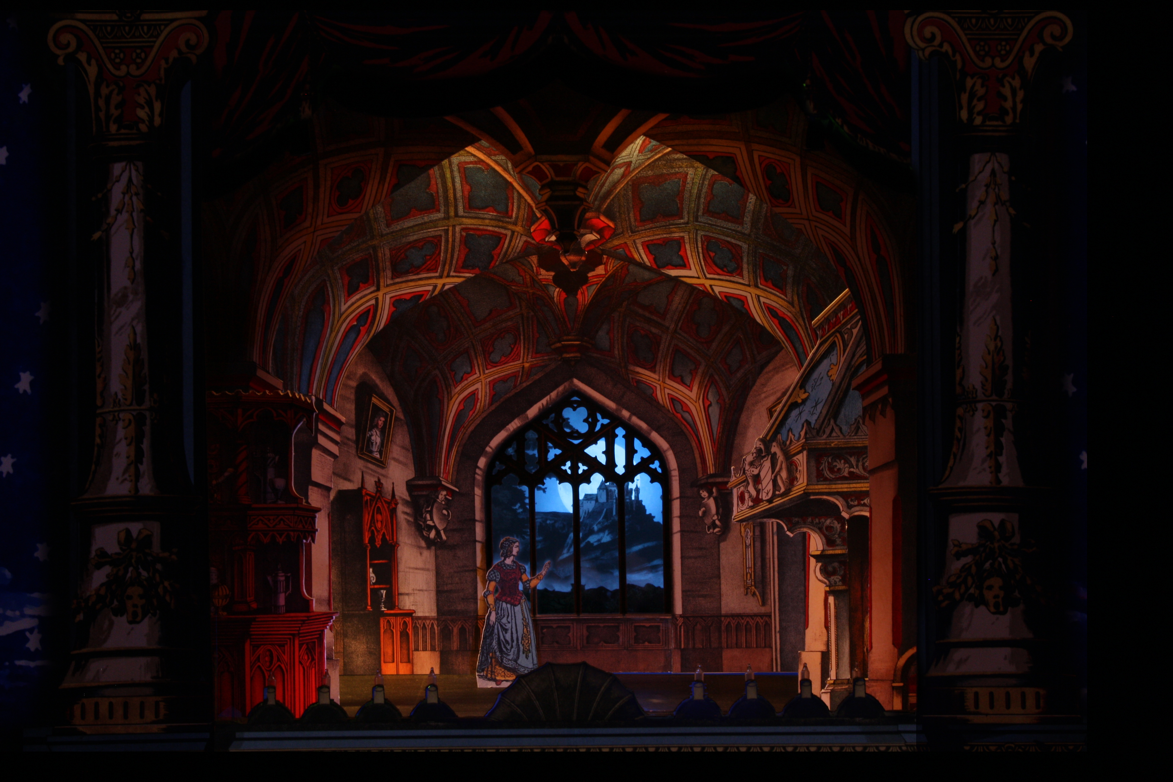 Der Freischütz, Akt II, zweiter Auftritt. Agathe: "Wie nahte mir der Schlummer, Bevor ich ihn gesehn?"